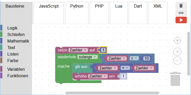 Einfaches Beispiel eines Blockly Programms zur Ausgabe von Quadratzahlen bis 10^2.